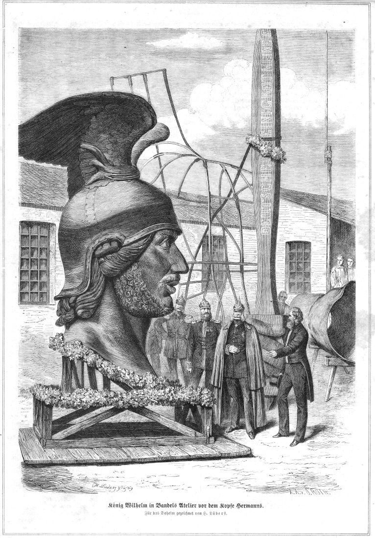 König Wilhelm von Preußen besucht Ernst Bandel bei seiner Arbeit 1869